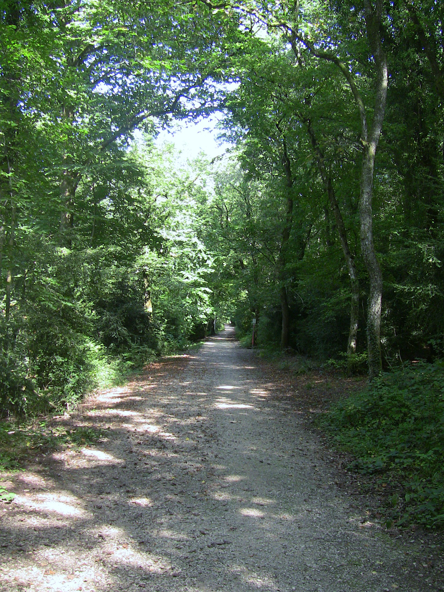 Un chemin dans le bois de Bregille à Besançon (Doubs, France).